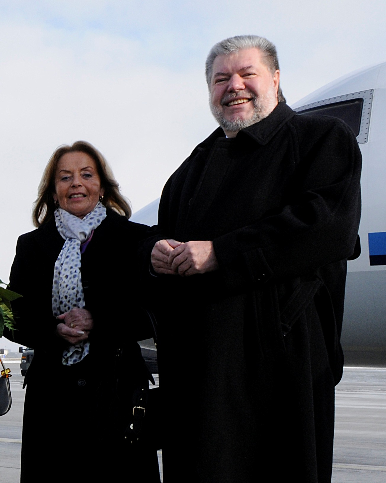 Kurt Beck mit Gattin Roswitha während eines Besuchs der Spangdahlem Air Base im Februar 2010.